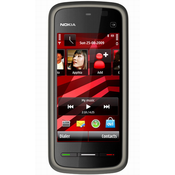 телефон Нокиа 5230